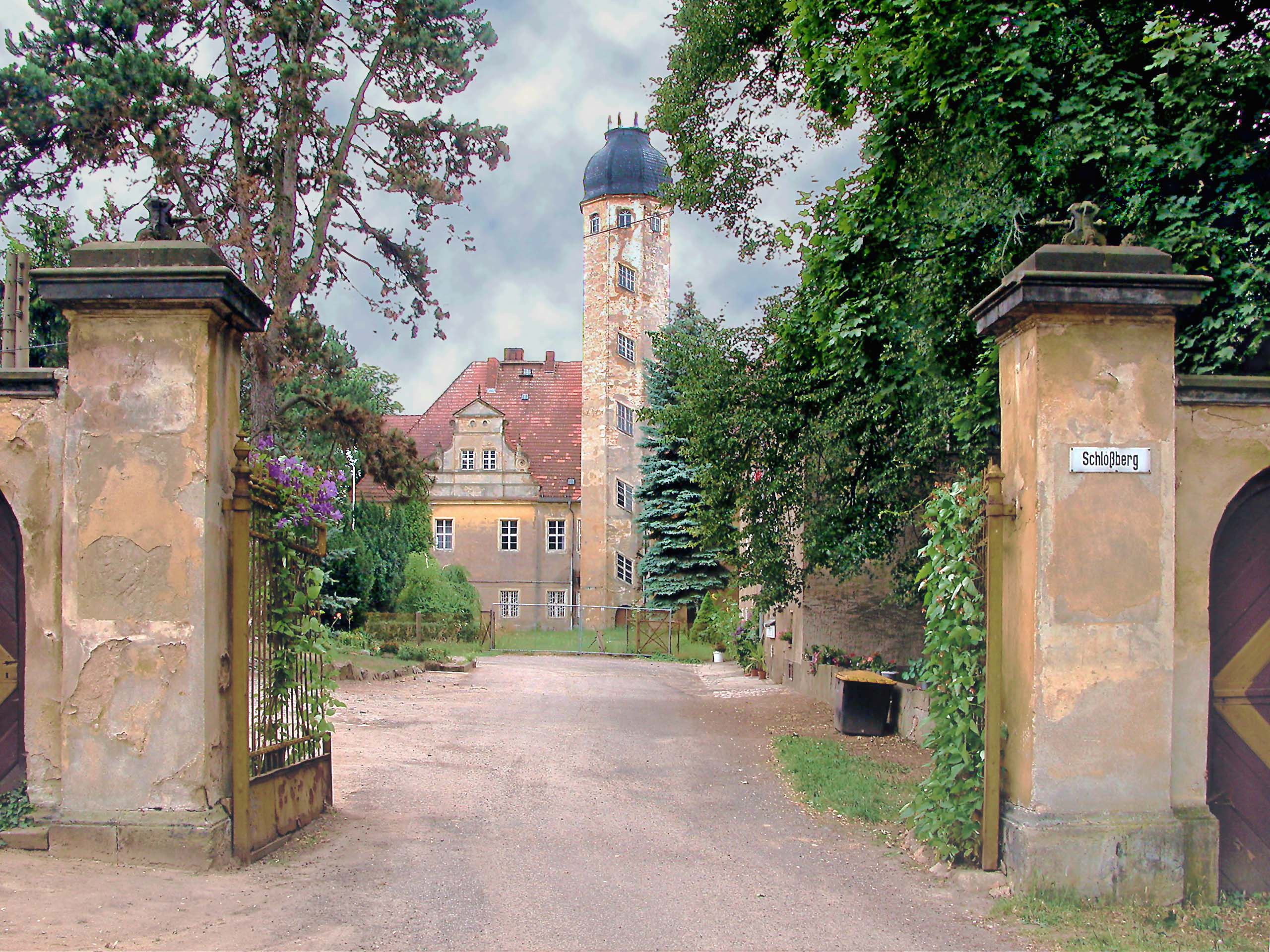 17.07.2003 01665 Schieritz (Diera-Zehren): Schloß, Heutiger Bau 1556-1601. [DSCN1451]20030717400JPG(c)Blobelt